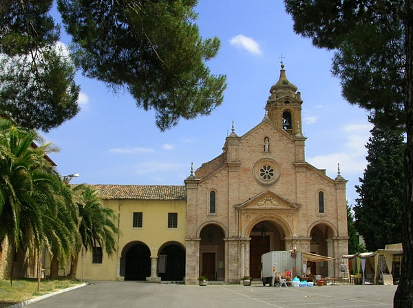 Descrizione:Teramo: Santuario della Madonna delle Grazie picture taken by user:Idéfix, july 2005